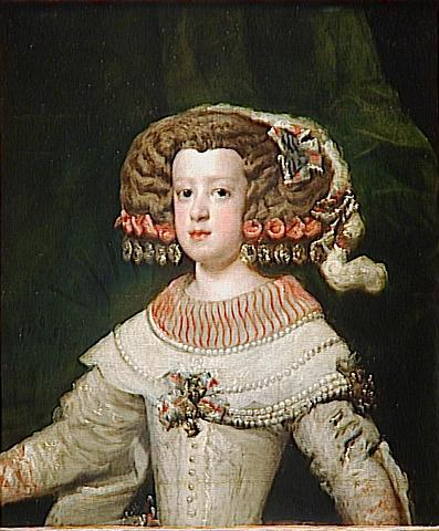 Marie-Thérèse d'Autriche (1638-1683), reine de France